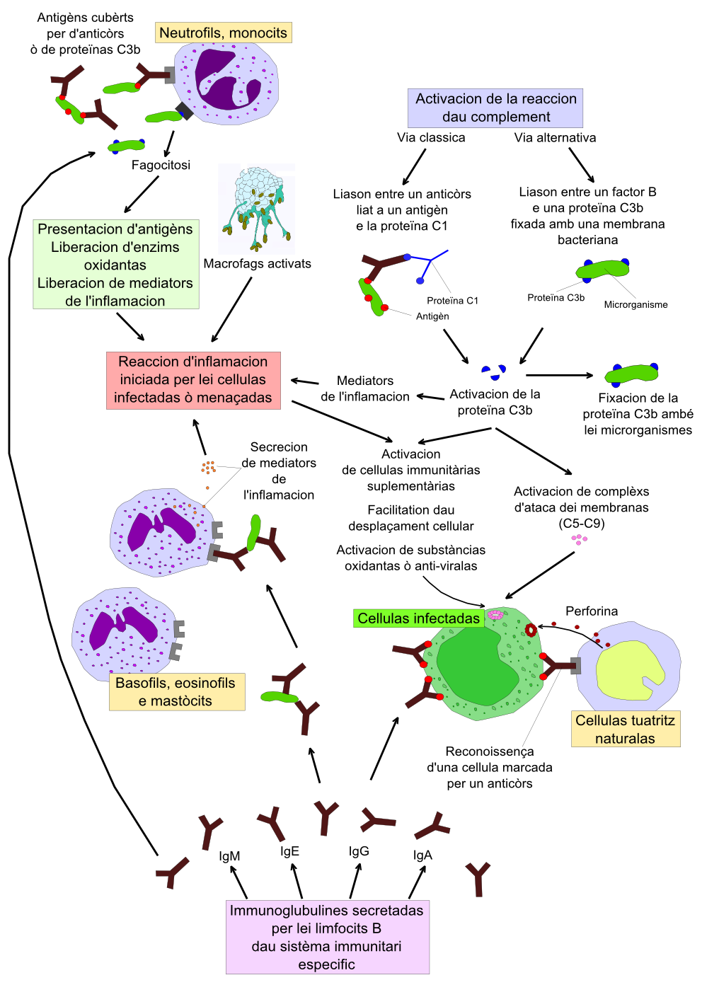 Esquèma generau dau sistèma immunitari innat renfòrçat per d'anticòrs dins l'òme.